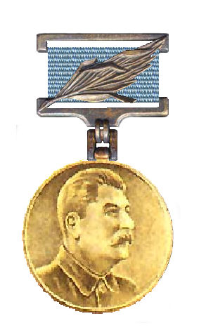 Medaille, gedragen door de laureaten van de tussen 1950 en 1955 uitgereikte Internationale Stalinprijs voor het versterken van de vrede tussen de volkeren